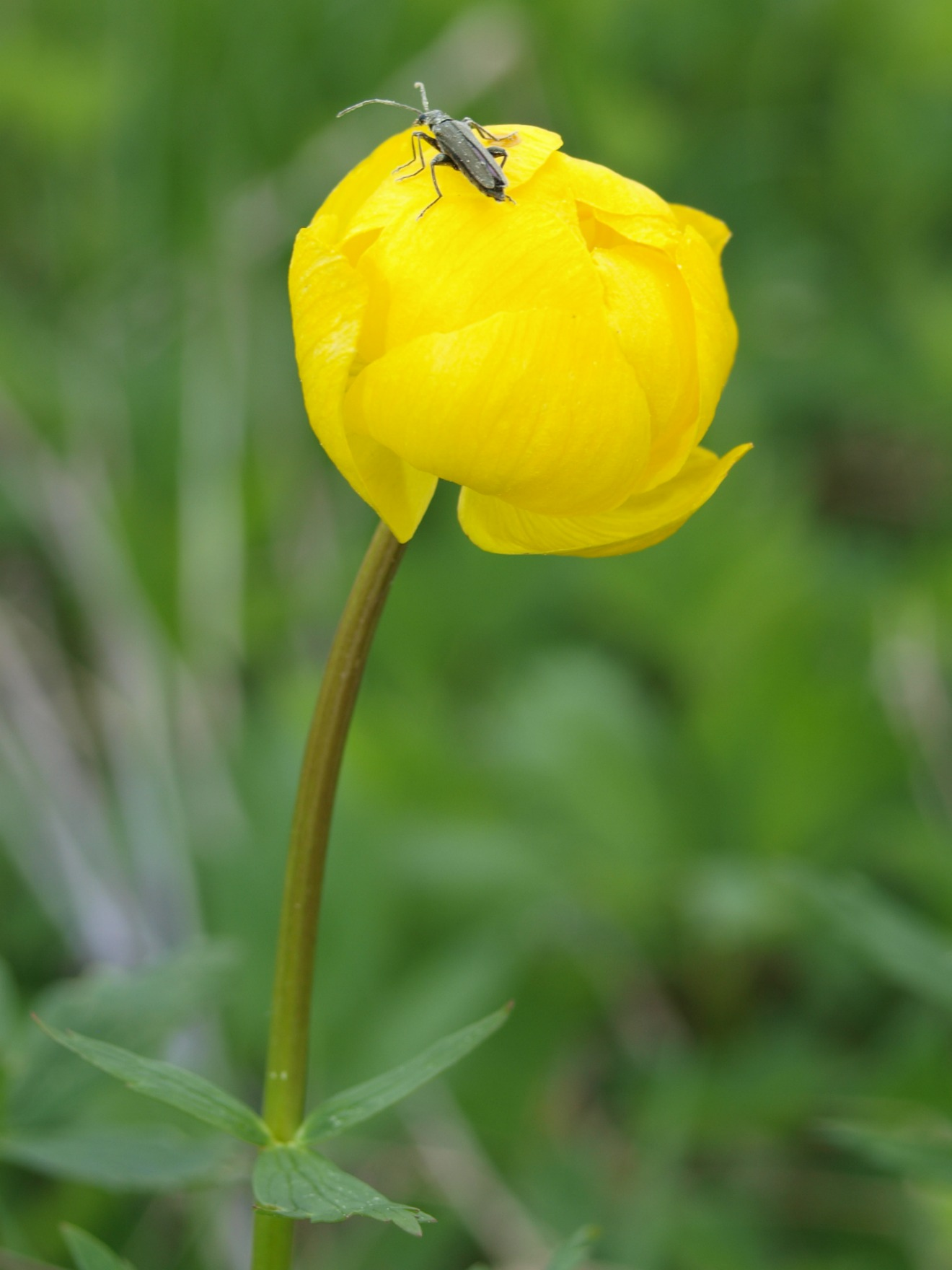 Pildistatud Perakülas Nõva vallas Läänemaal.